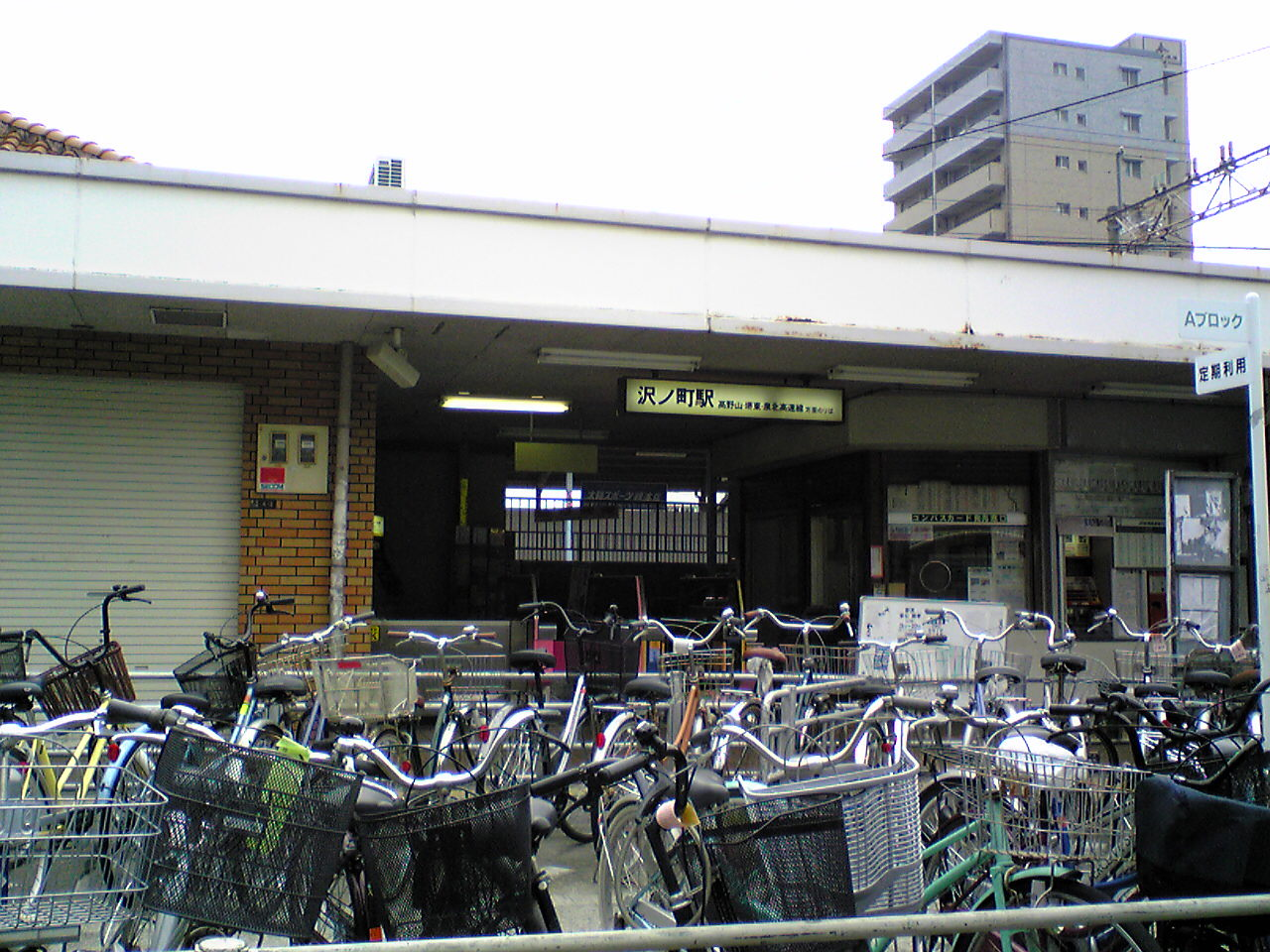 沢ノ町駅東口（堺東方面）の画像。撮影後の編集はなし。